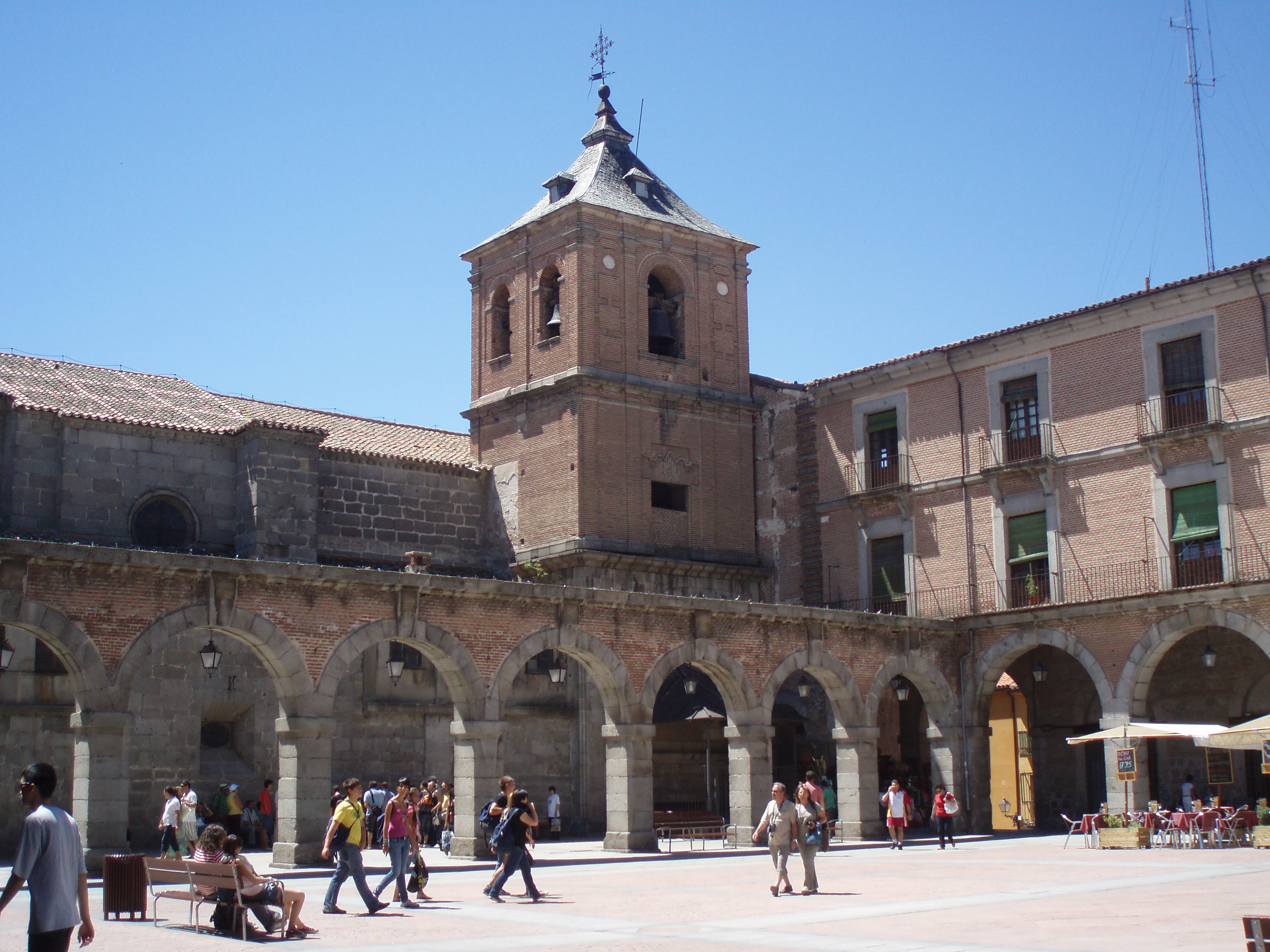 Plaza del Mercado Chico